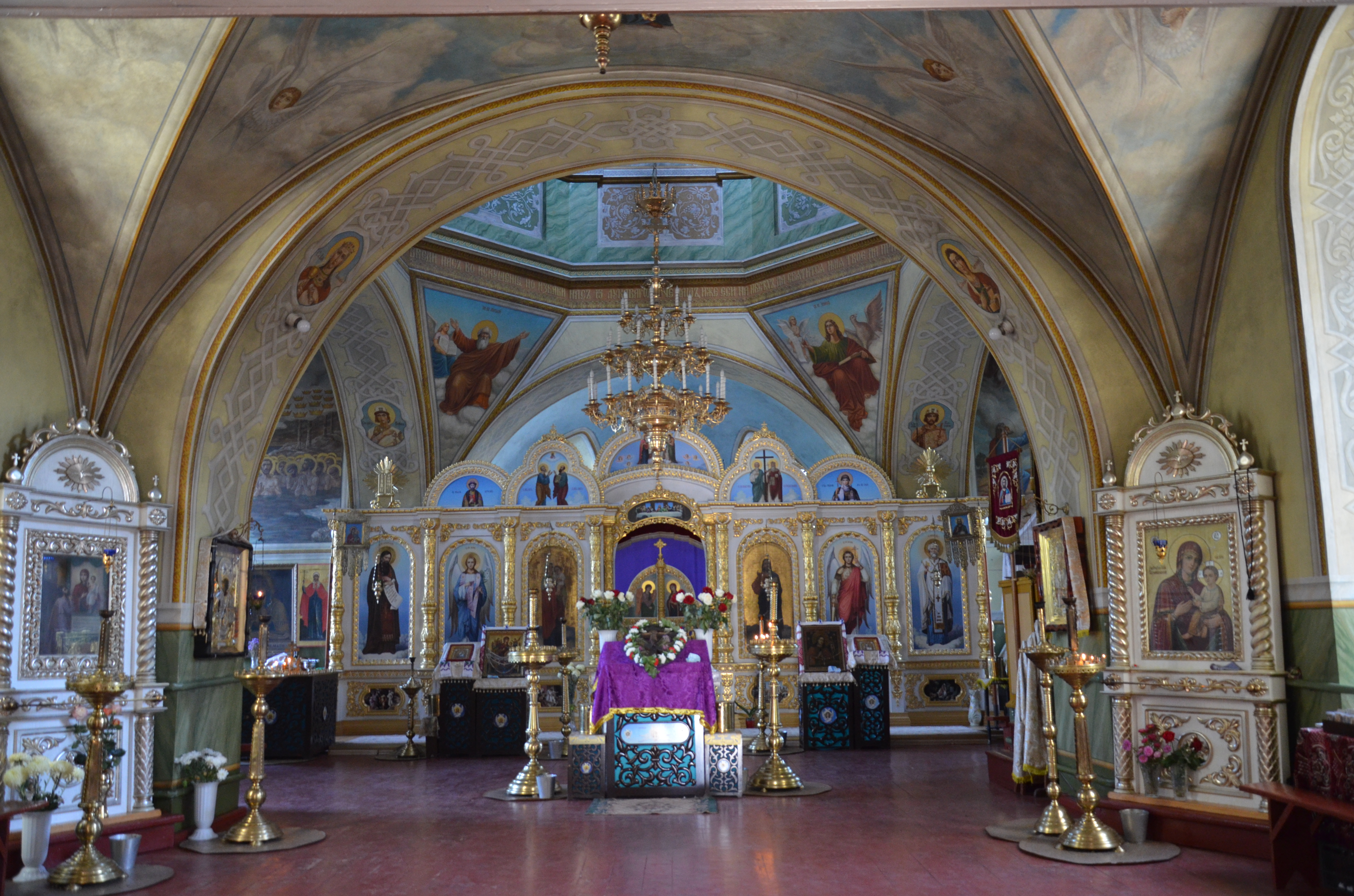 Миколаївська церква (мур.), Васильків, вул. Шевченка, 11